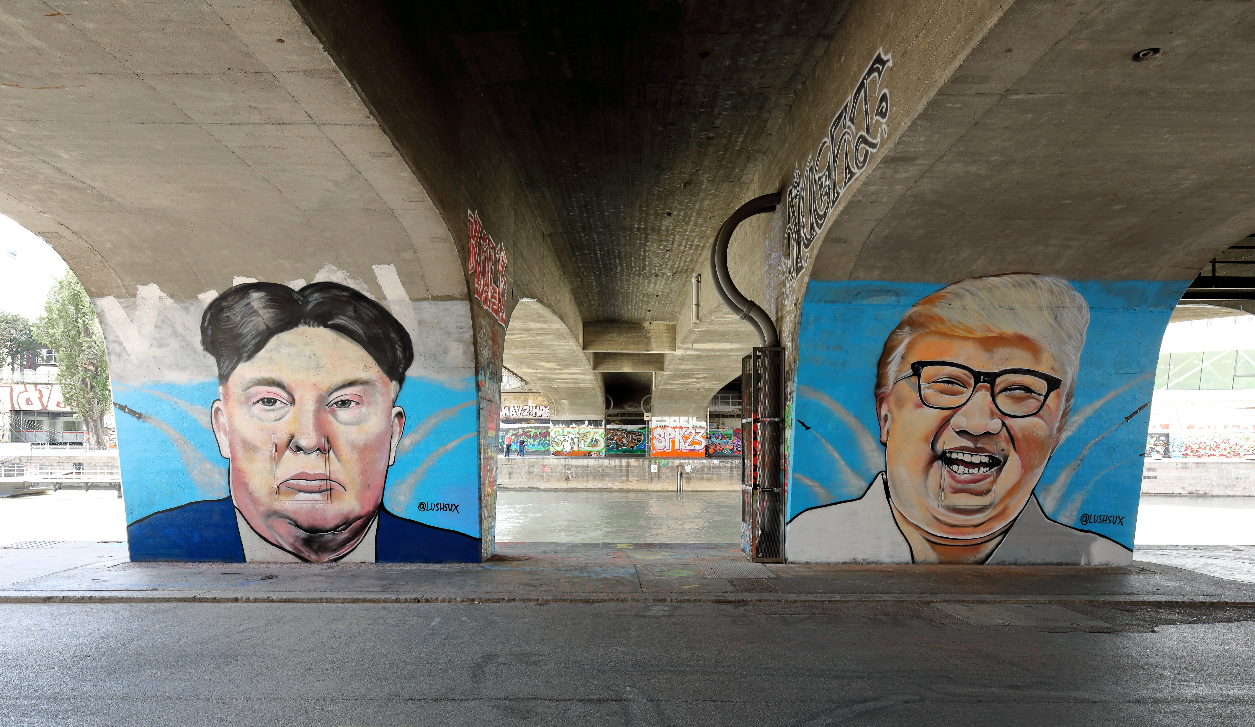 2 Graffitis von dem australischen Graffiti-Künstler Lush Sux an den nördlichen Pfeilern der Schwedenbrücke in der österreichischen Bundeshauptstadt Wien. Die Graffitis sollen den US-Präsidenten Donald Trump und den nordkoreanischen Staatschef Kim Jong-un darstellen, wobei er deren Frisuren vertauschte.